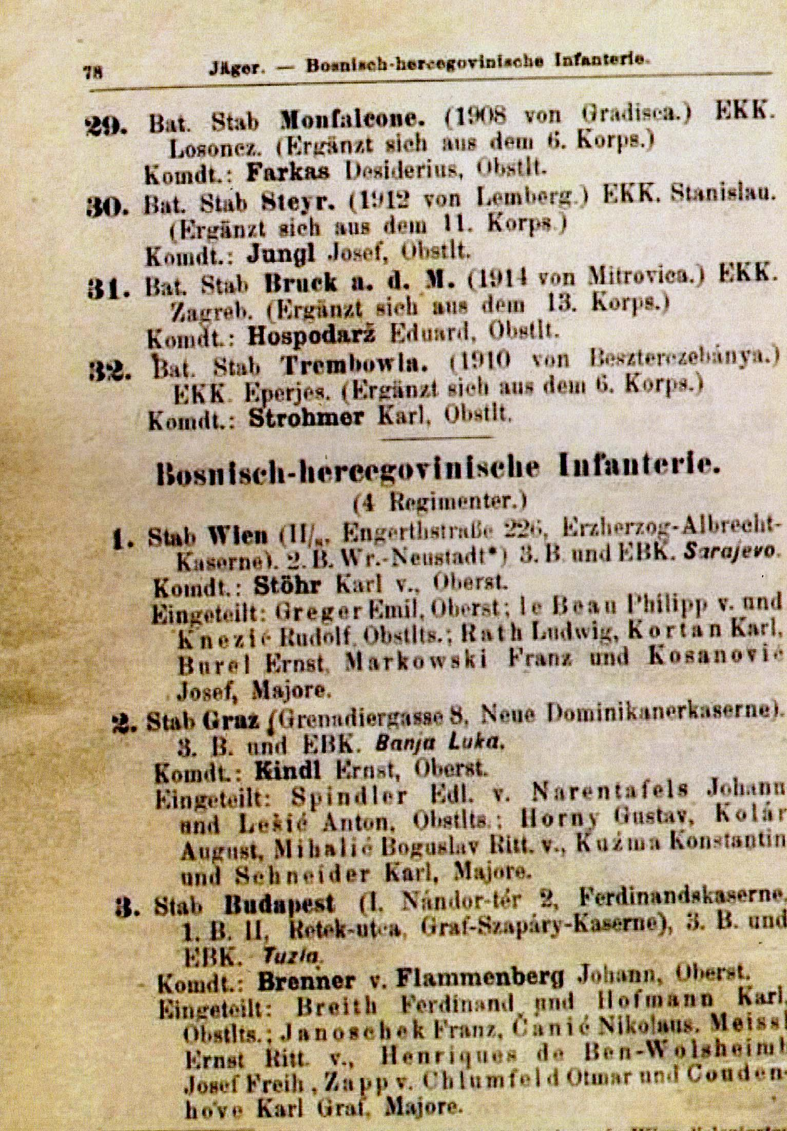 Dislozierung und Einteilung der k.u.k. Armee